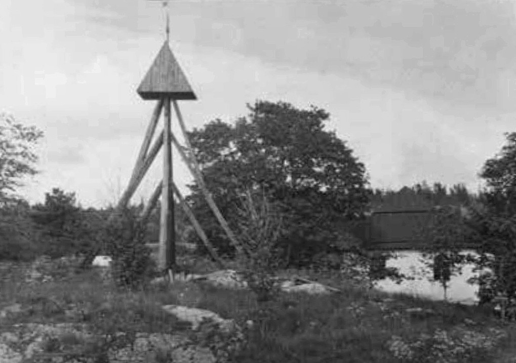 Torö kyrkas gamla klockstapel